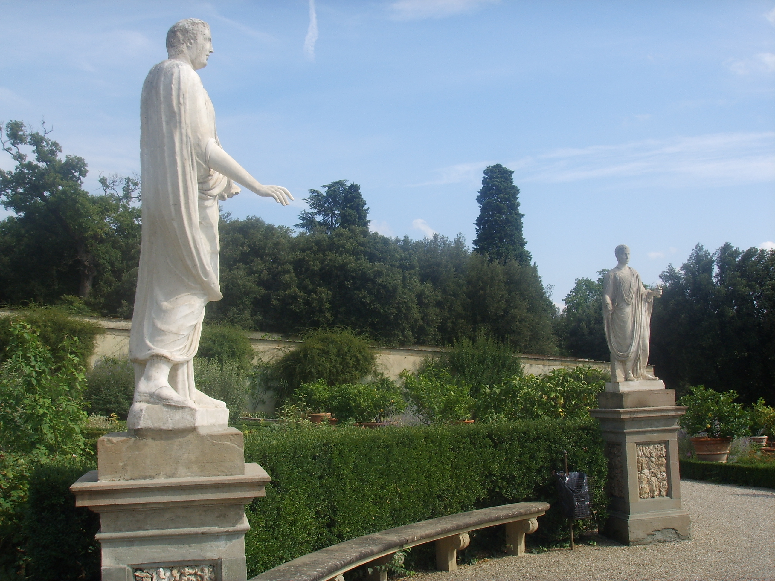 Parco di Villa Reale di Castello (Villa di Castello) in Florence Italy